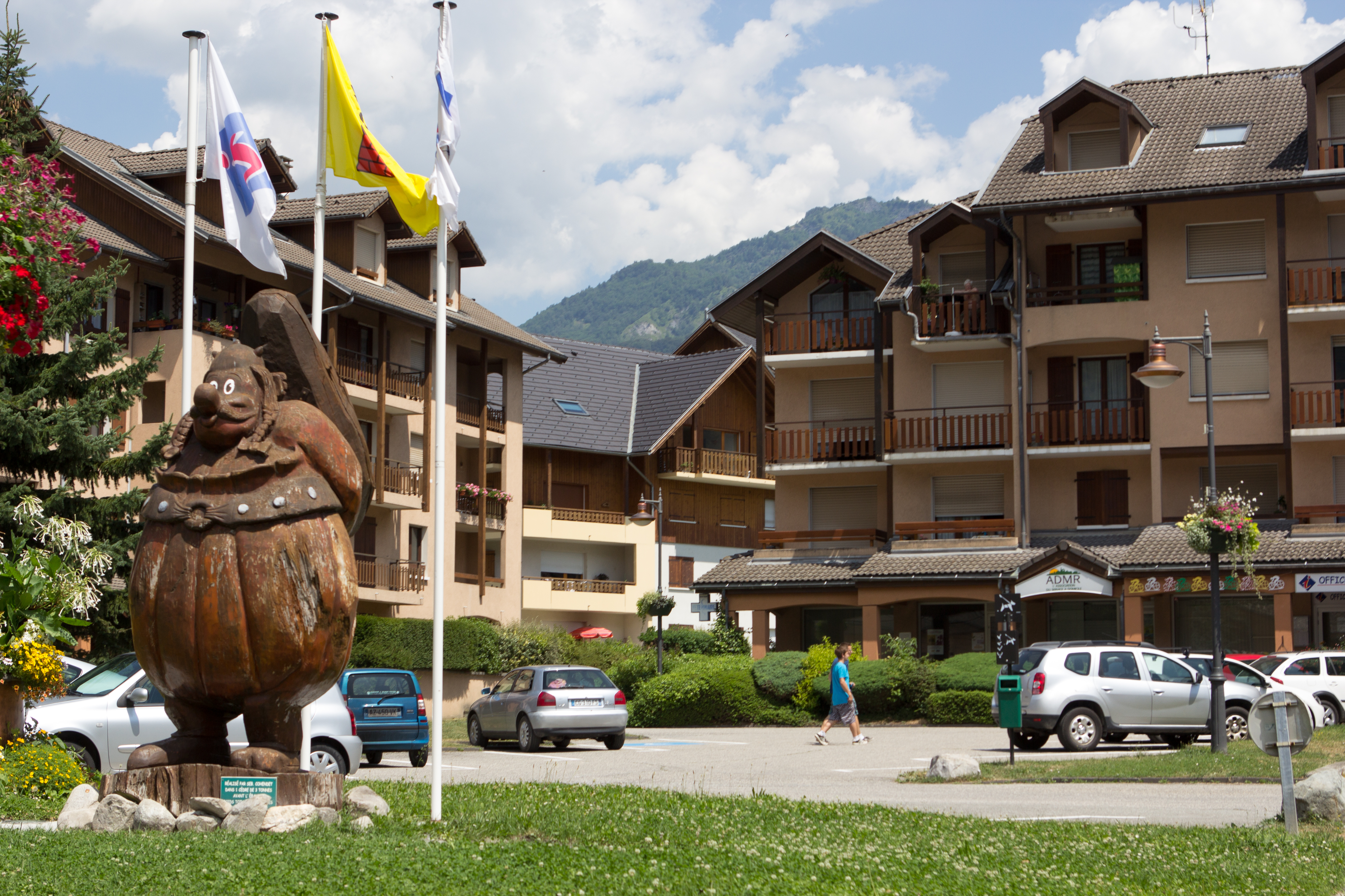 Vue de La Chambre / La Chambre / Savoie / France